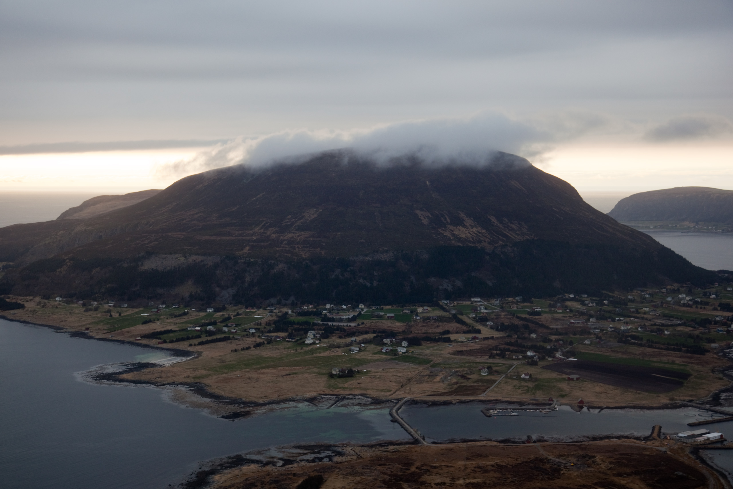 Lepsøya sett frå fly i søraust (på veg mot Vigra). Lausundholmen nærast